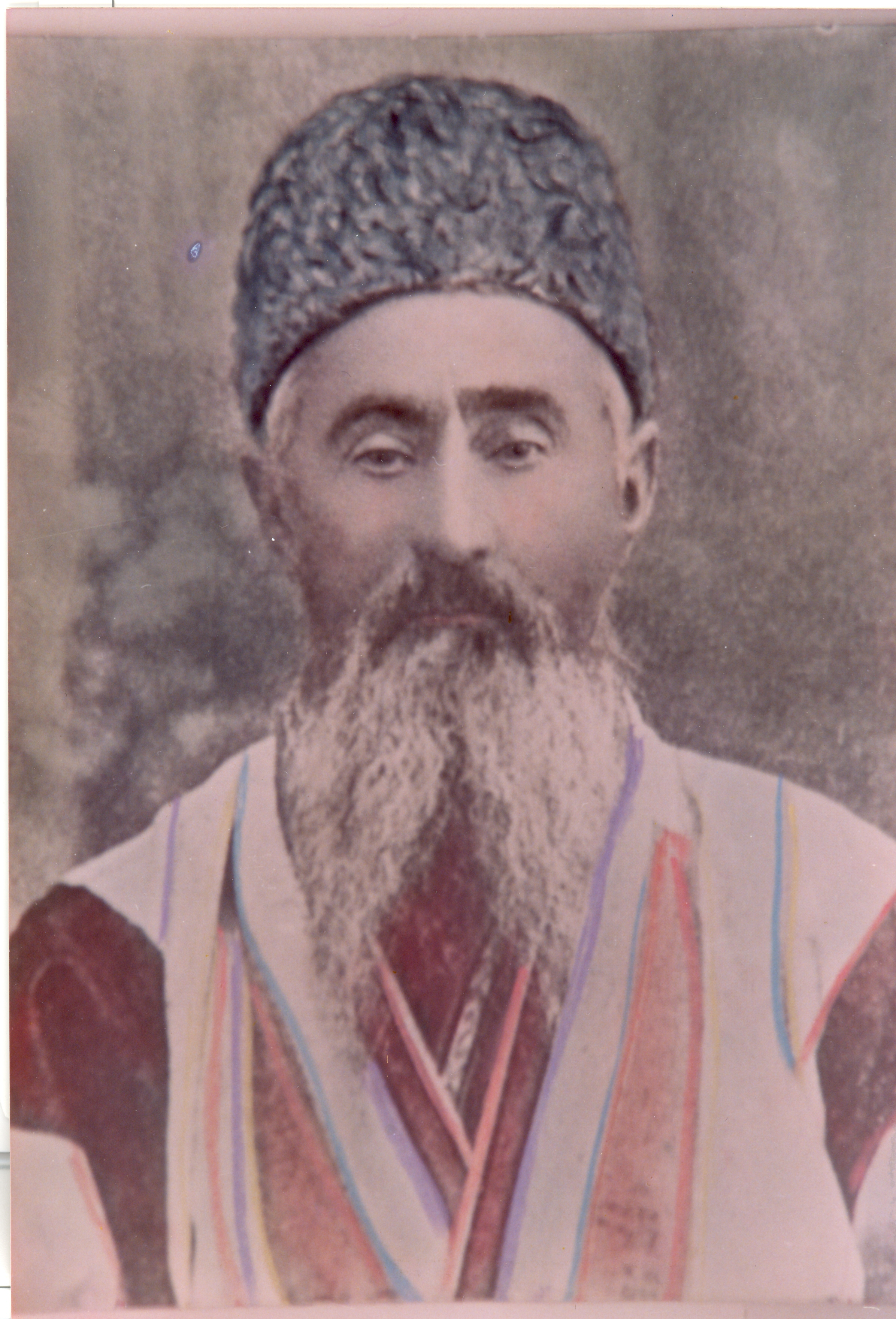 הרב חזקיה הכהן רבין זצ"ל - רבה של בוכרה